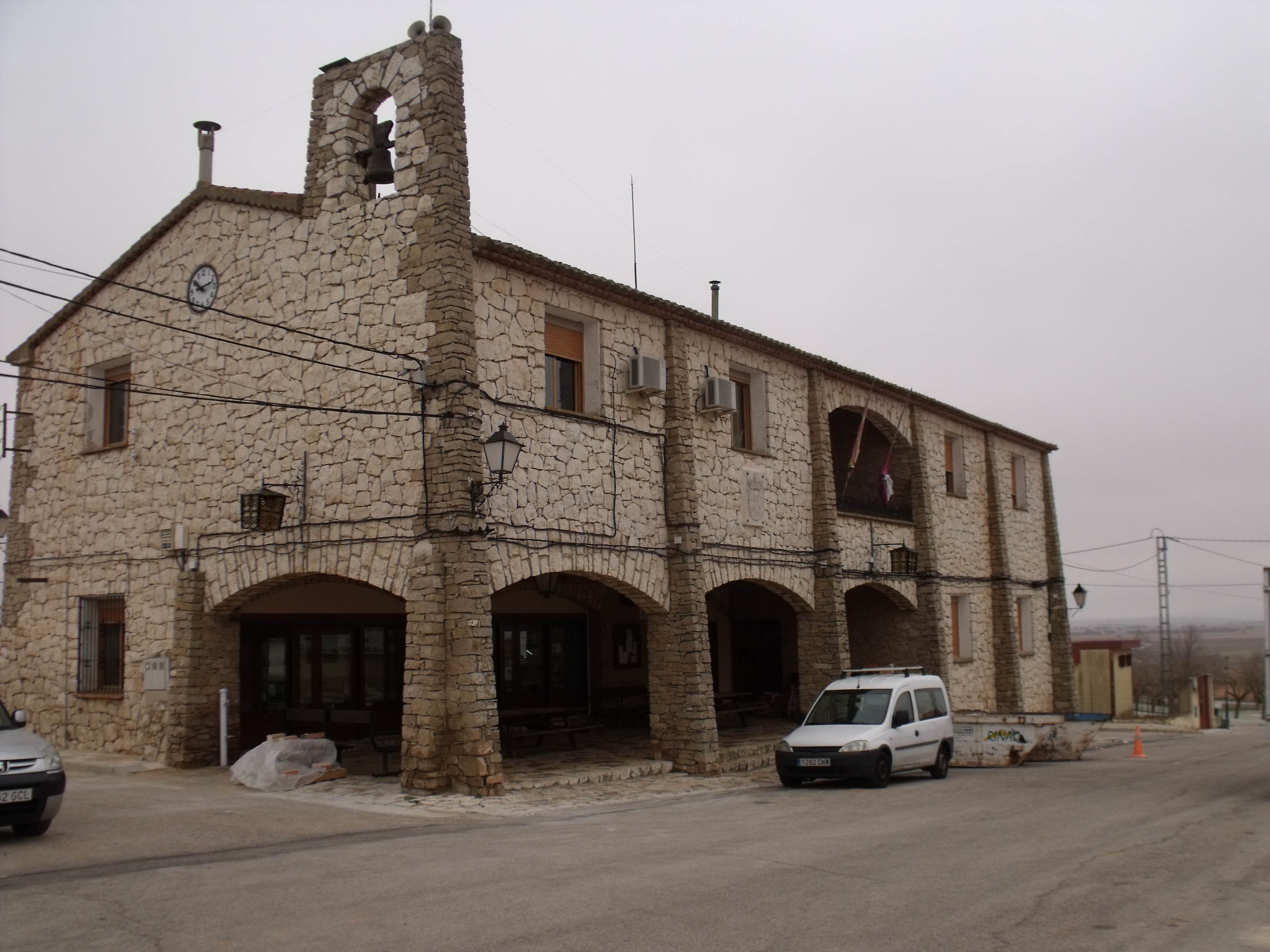 Exterior del Ayuntamiento de Villa de Ves